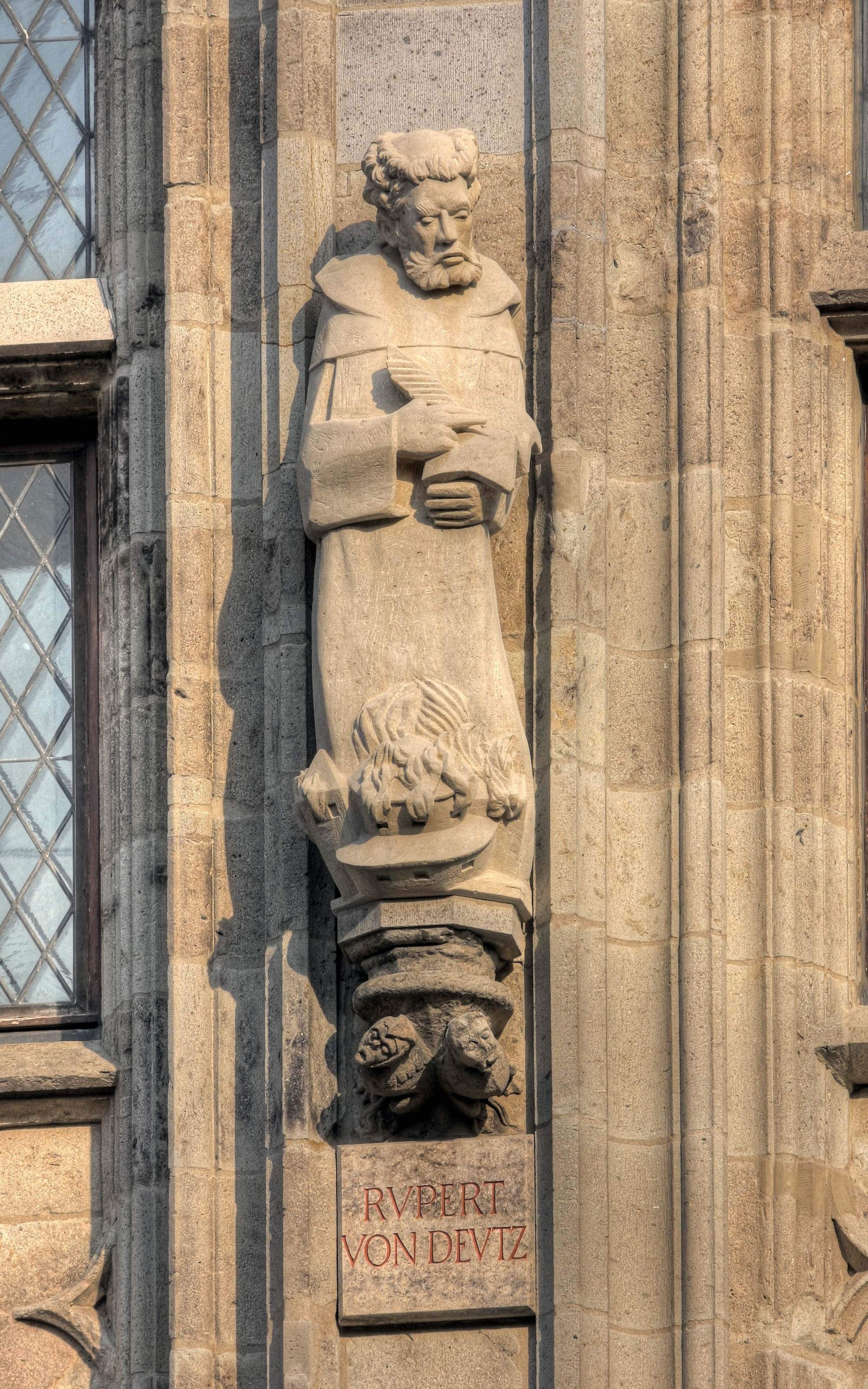 Rathausturm Köln mit der Figur des Rupert von Deutz Details zu der Statue: Bildhauer der Deutz-Statue: Stefan Kaiser Details zu der Konsole: Thema der Konsole unter der Deutz-Statue: „Fabelwesen“. Bildhauer: unbekannt, Original aus dem 15. Jahrhundert